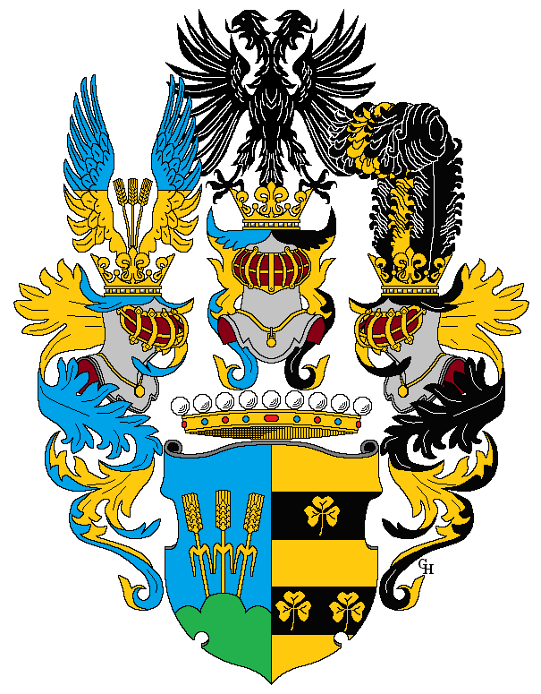 Wappen des österreichisch-ungarischen Politikers Alois Freiherrn Lexa von Aehrenthal (1854–1912), verliehen anlässlich seiner Erhebung in den österreichischen Grafenstand 1909. Zeichnung von Gerd Hruška ( Für weitere Informationen zu dieser Standeserhebung siehe (